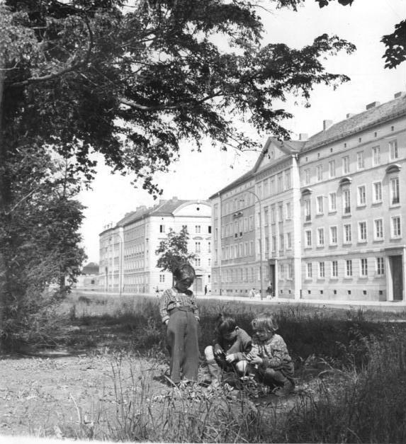 Dessau, Friedensplatz, Neubauten Zentralbild Klein 24.6.1955 Das neue Dessau Die Industriestadt Dessau, deren Innenstadt durch die barbarischen Bombenangriffe des letzten Krieges zu 80% zerstört wurde, erhält durch ein großzügiges Wiederaufbauprogramm ein modernes, schönes Gesicht. In der Innenstadt sind bereits völlig neue Strassenzüge entstanden. UBz: Blick auf die in diesem Jahr entstandenen Wohnbauten am Friedensplatz.